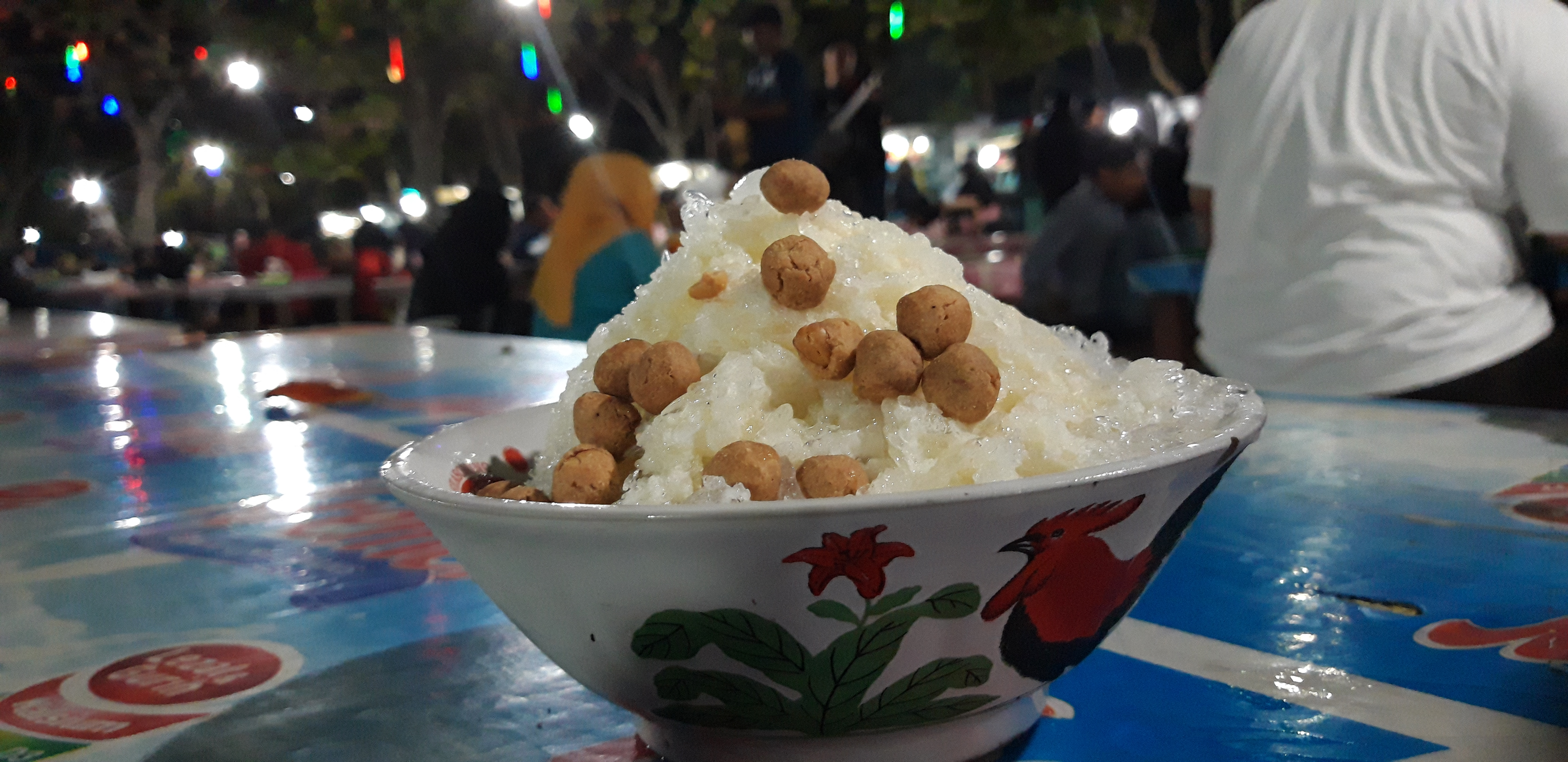 Es teler, eeets jangan mikir negatif dulu yah. Ini bukan minuman yang memabukkan kok, tapi malah mengenyangkan dan menyegarkan. Bentuknya sih mirip es campur ya tapi ini beda, didalemnya juga banyak macamnya kaya saudaranya itu, tapi es satu ini pake tambahan gula jawa. Jadi walau bentuk mirip tapi rasa tetap beda